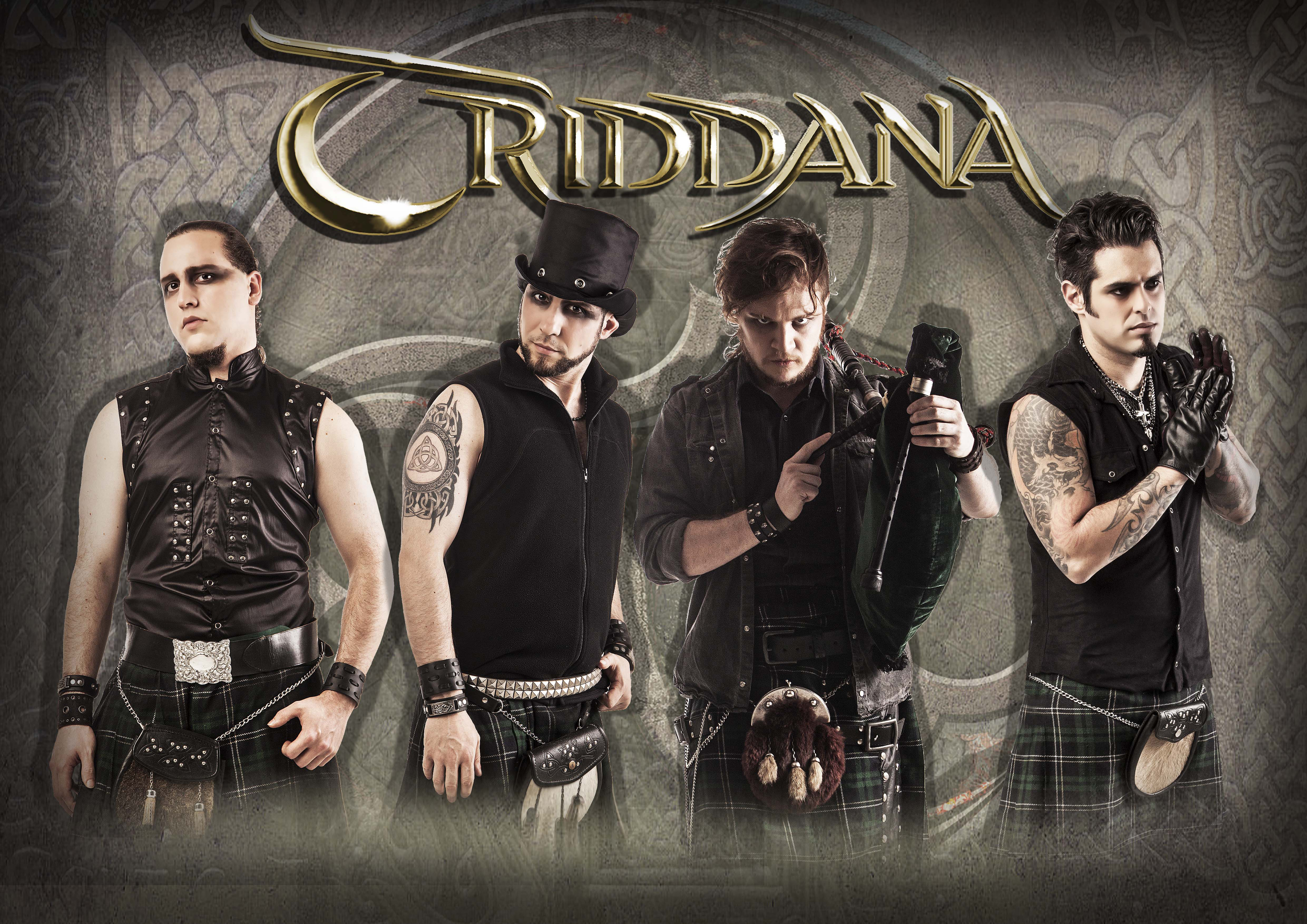 Mitglieder der Band Triddana 2016